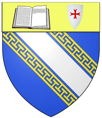 Blason de Mesnil saint Loup